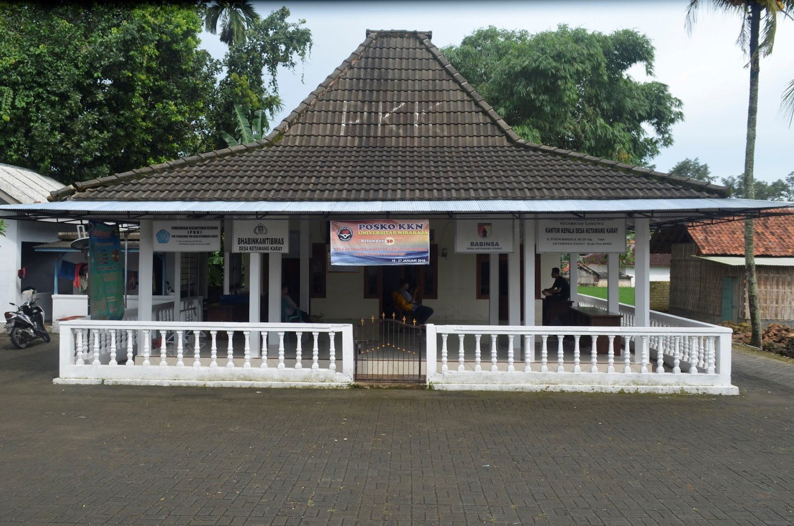 Foto Balai Desa Ketawang Karay Hasil Jepret Tahun 2018